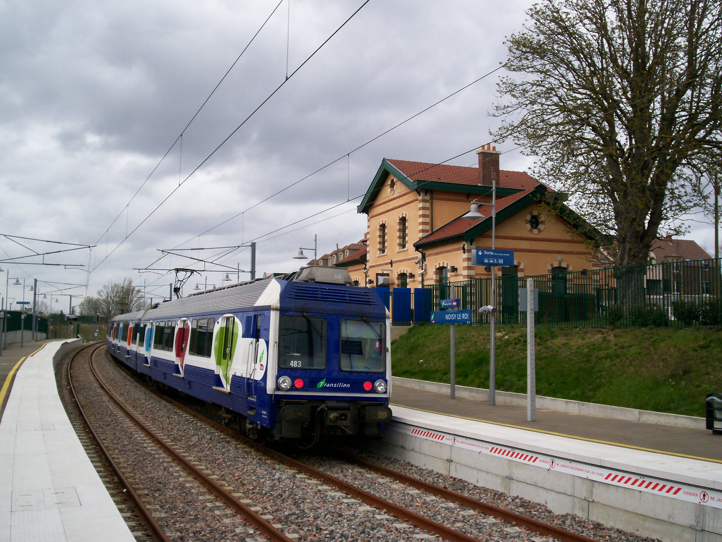 Vue du bâtiment voyageurs de Noisy-le-Roi ainsi que du train GCO